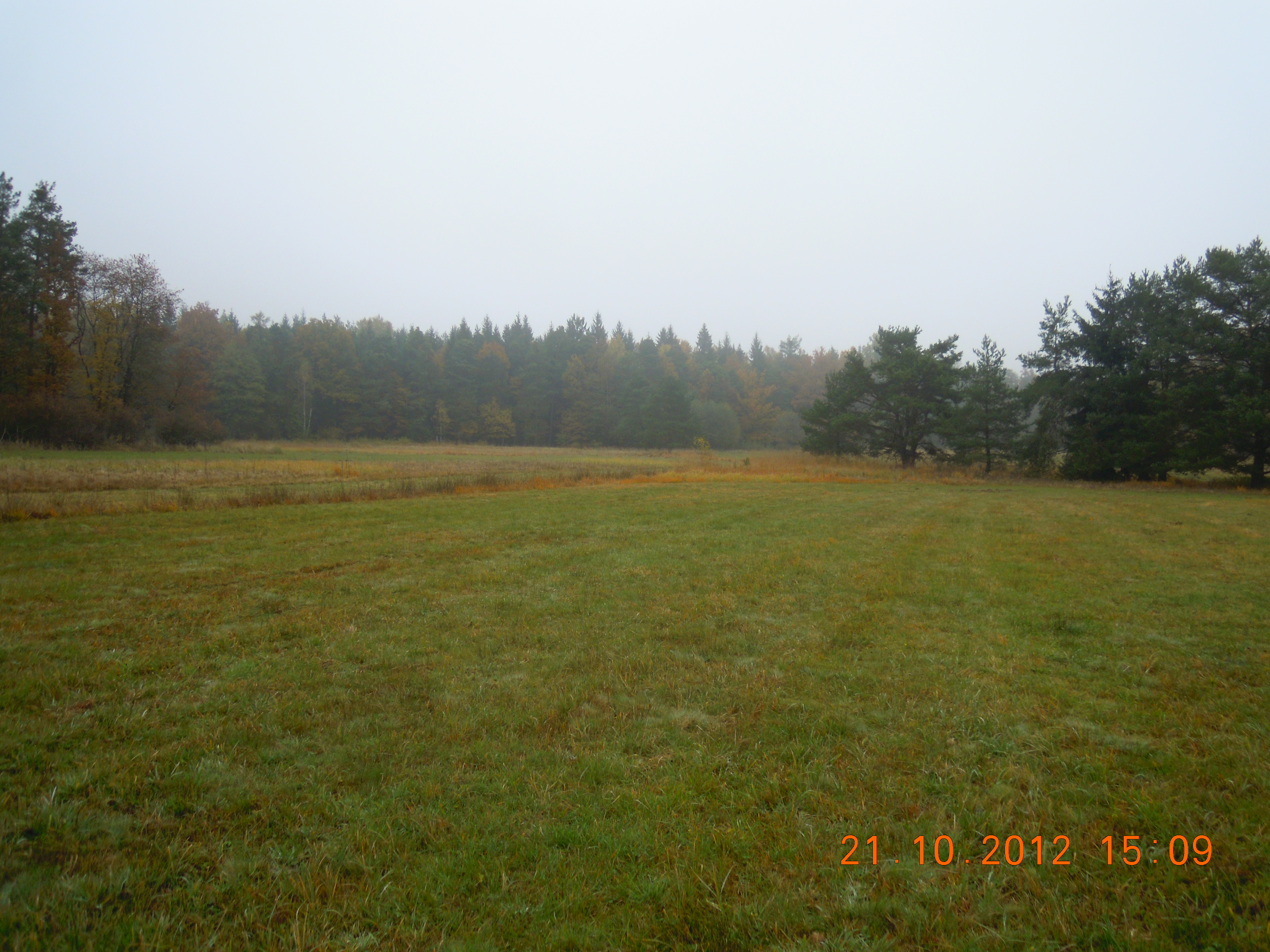 Pohled na louku1 v PR Andelske schody